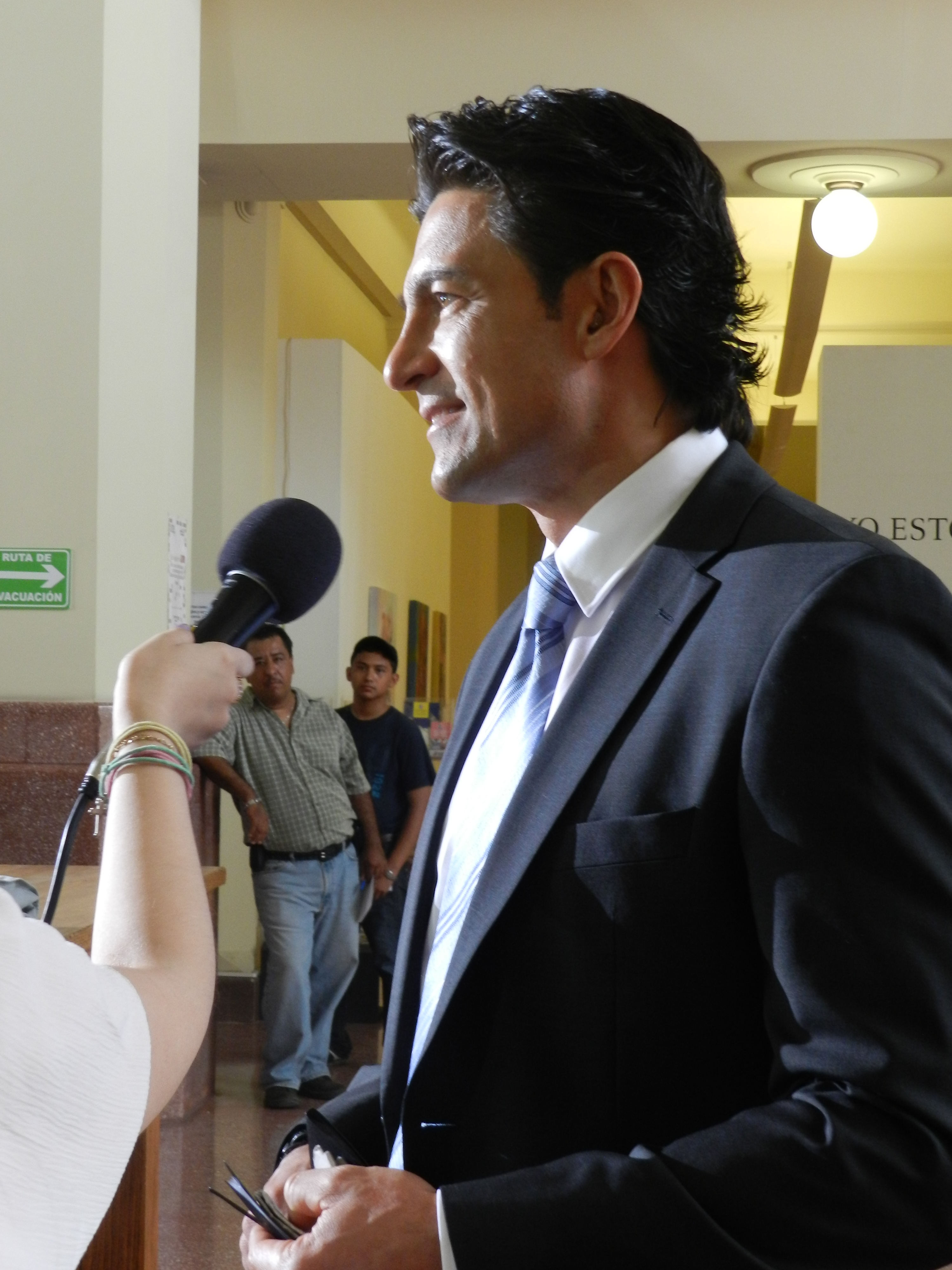 Fernando Colunga durante una conferencia